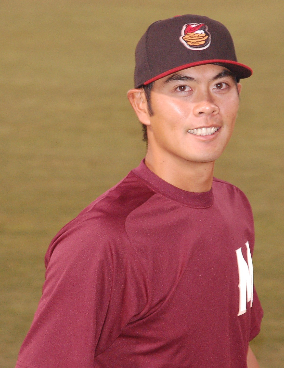 羅錦龍於科羅拉多洛磯隊小聯盟時期。